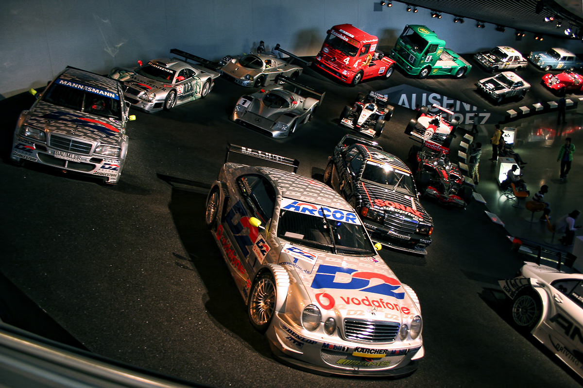 Legend Room, Mercedes-Benz Museum, Stuttgart